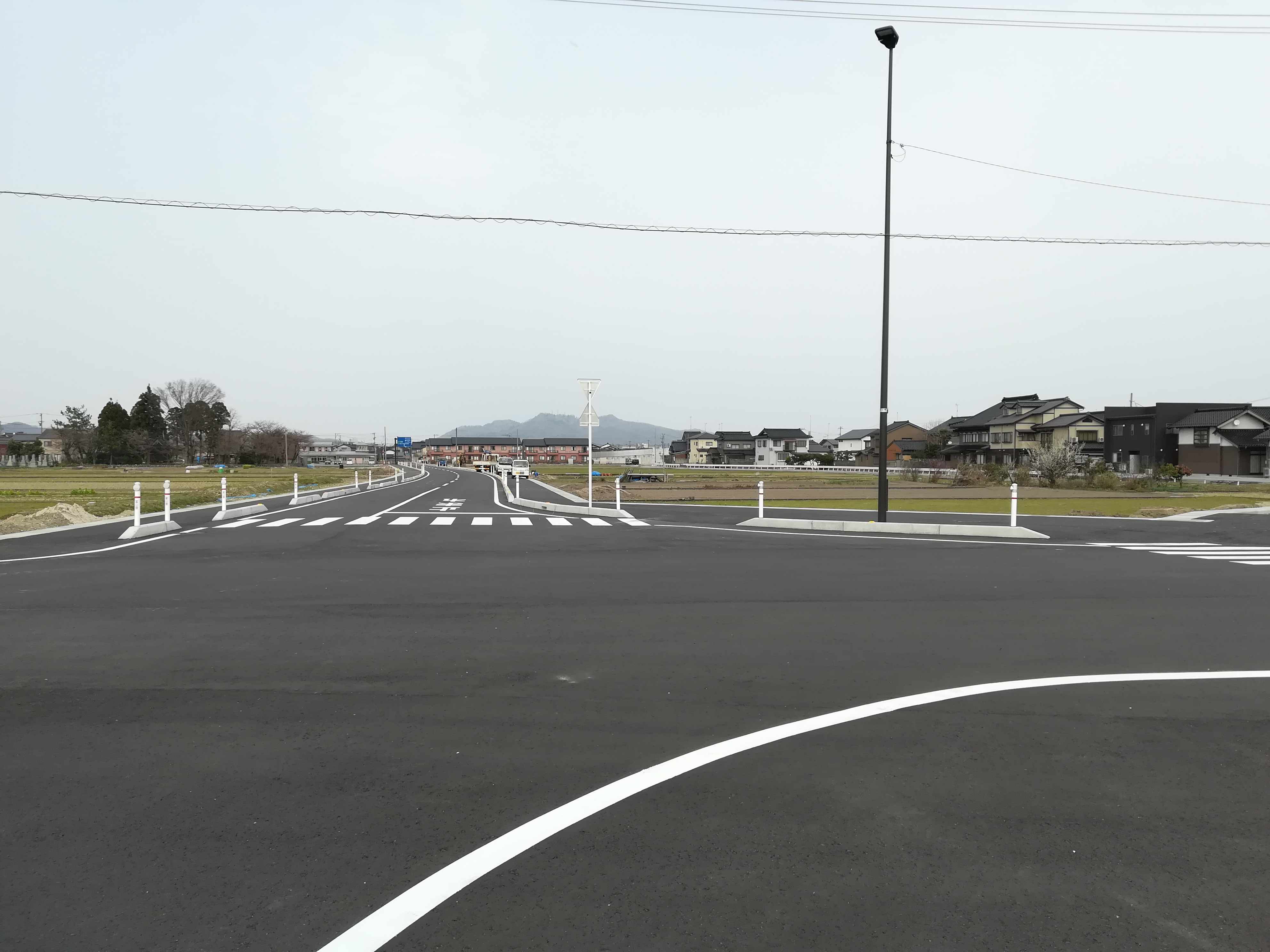 富山県道131号高岡やぶなみ停車場線、高岡やぶなみ駅駐車場そばの交叉点から